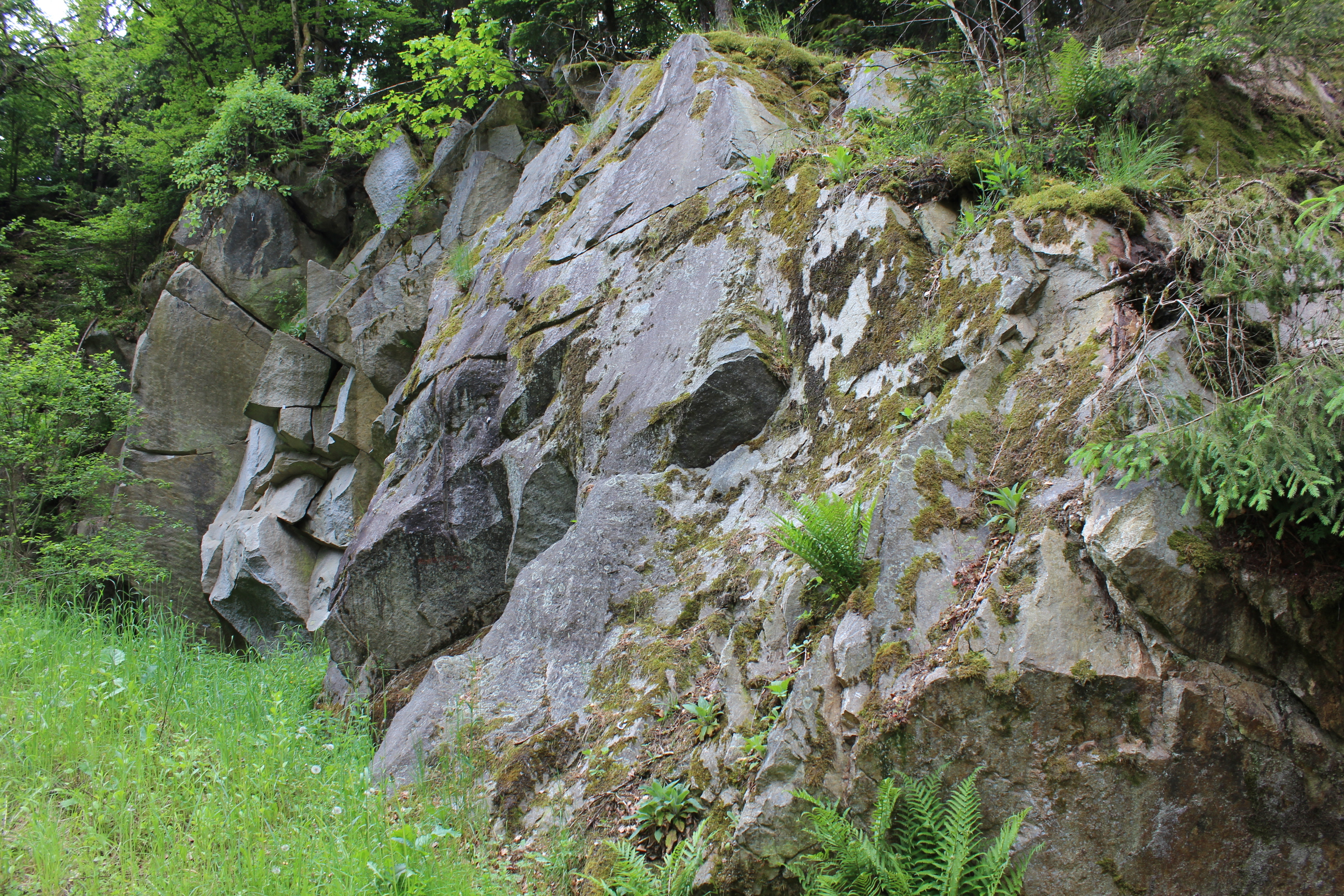 Der ehemalige Granitsteinbruch Schleifmühle bei Metten gehört zu den Geotopen im Landkreis Deggendorf mit der Nummer 271A013.